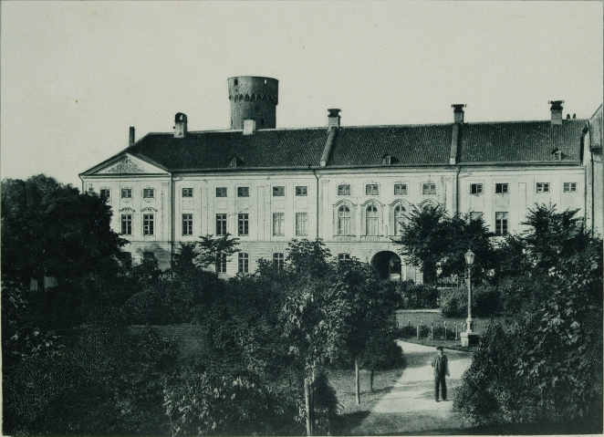 Toompea lossi esine park